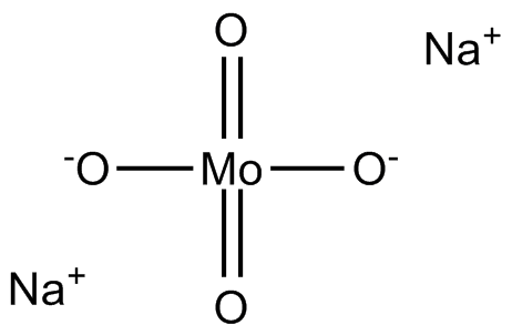 Natriummolybdaat Chemical structure of sodium molybdate. Created by the author in ChemDraw.